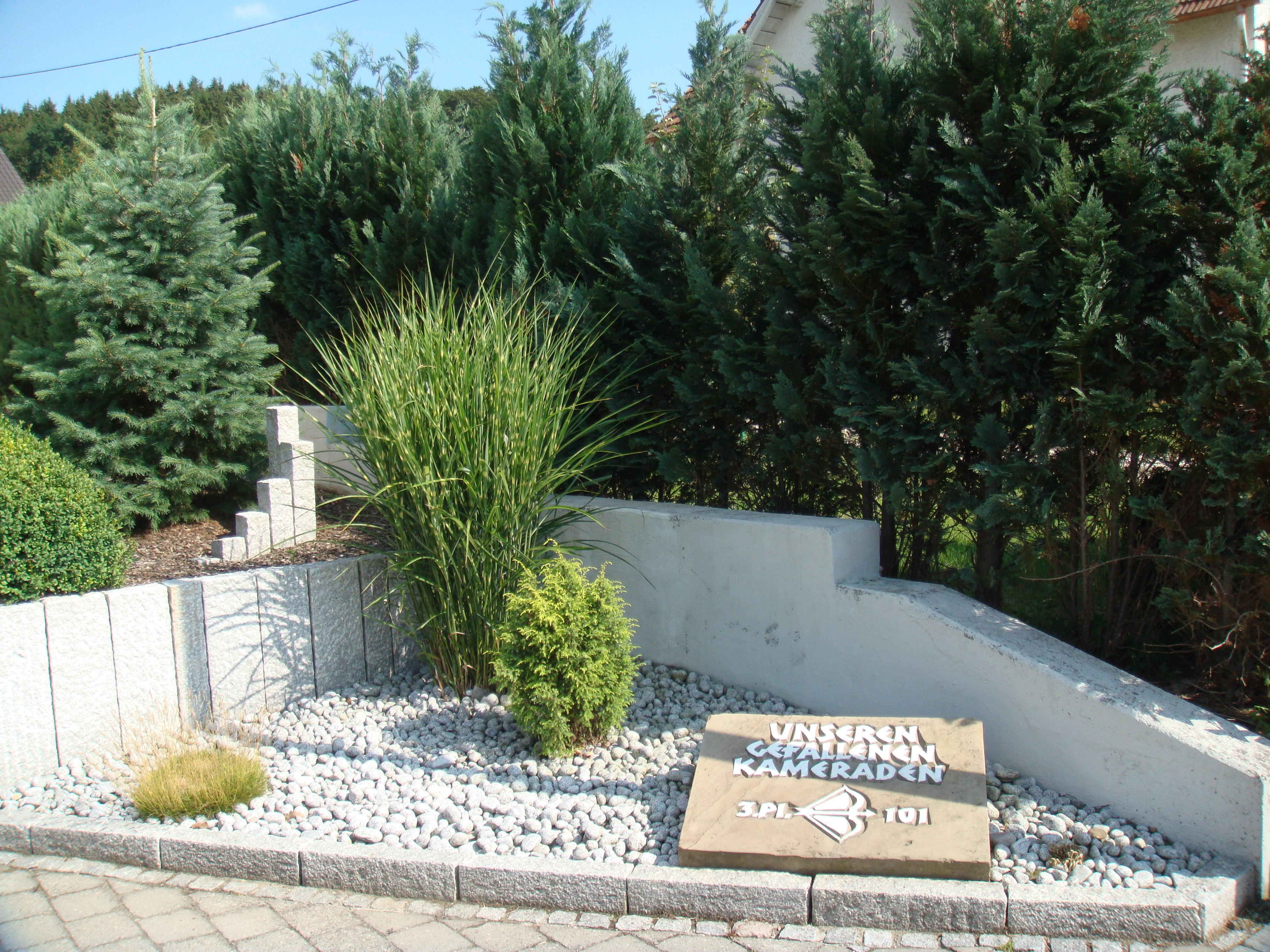 Illerrieden, Gedenkstein an der Wendelinuskapelle für die Gefallenen der 3. Pi/101. Infanteriedivision